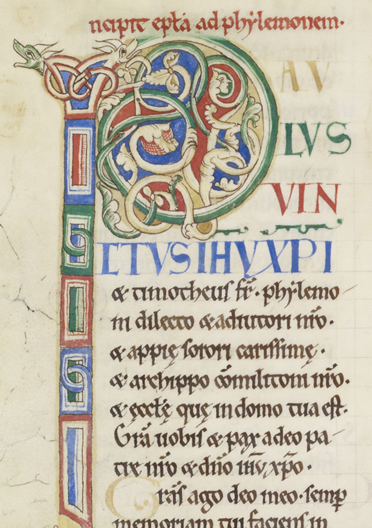 incipit epistula ad phylemonem. PAULUS VINCTUS JESU CHRISTI & timotheus frater, philemoni dilecto & adjutori nostro, & appie sorori carissime, & archippo commilitoni nostro, & ecclesie, que in domo tua est. Gratia vobis, et pax a deo patre nostro, et domino iesu christo. Gratias ago deo meo, semper memoriam tui faciens in [orationibus meis]